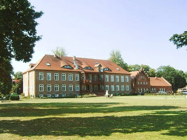 Gutshaus und Hotel in Ludorf / Müritz in Mecklenburg Vorpommern